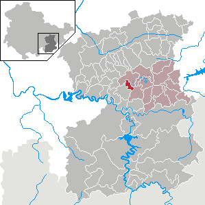 Bucha in Thuringia - Saale-Orla-Kreis